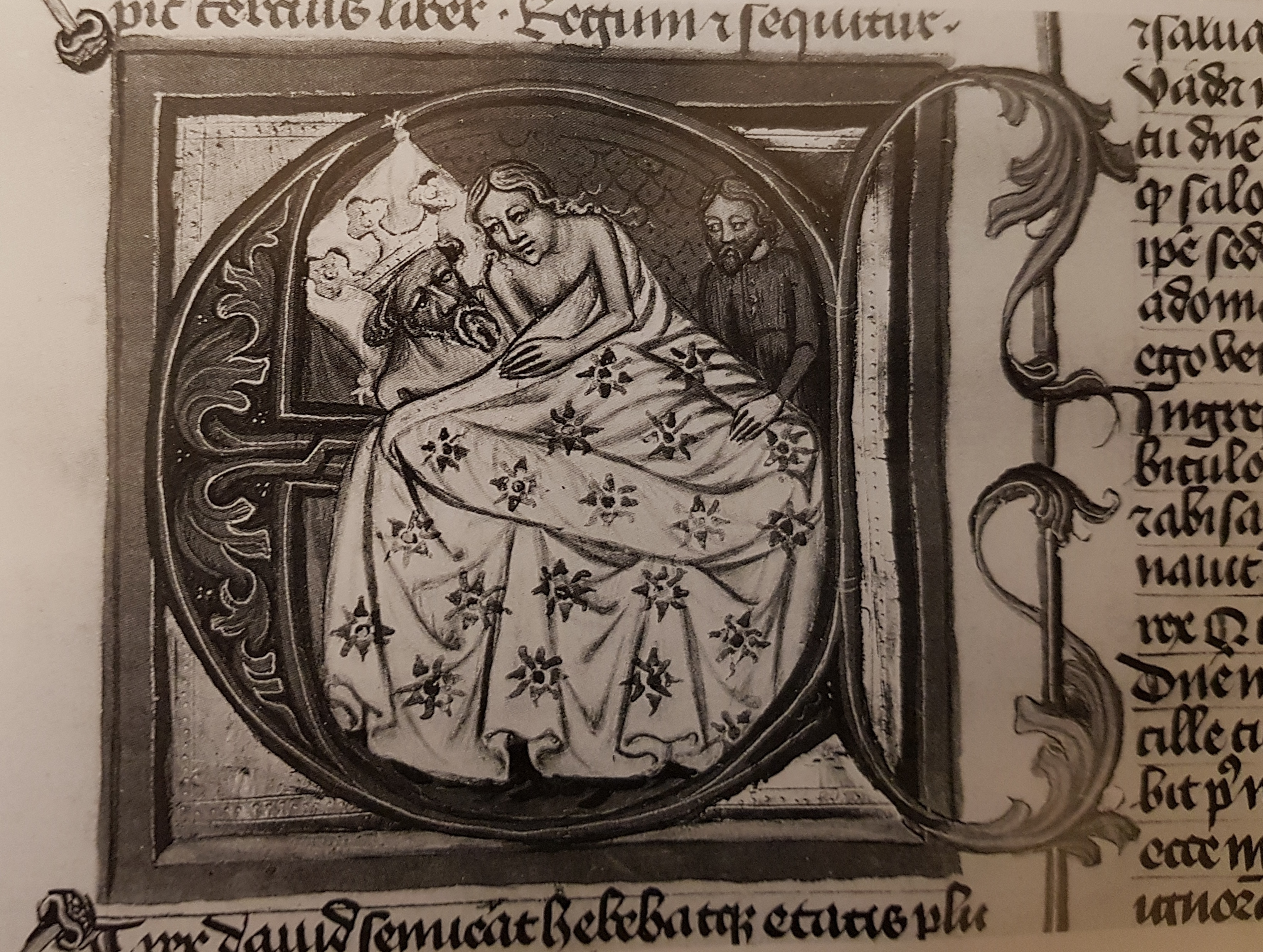 Iluminacja - inicjał E z Biblii Hutterów, autorstwa Mistrza Biblii Hutterów